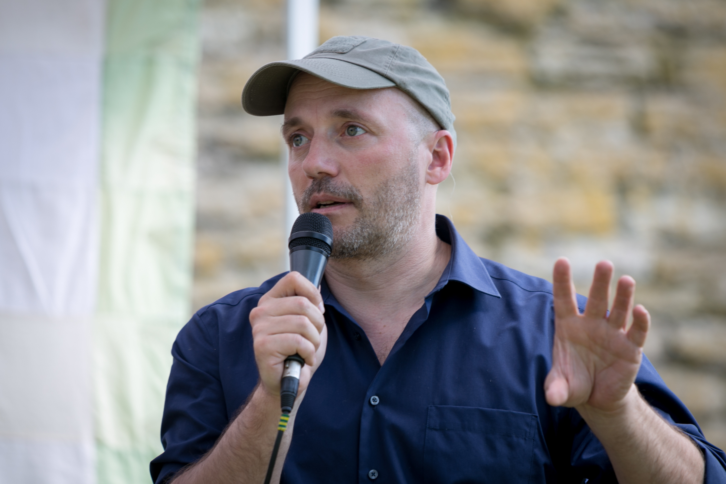 Arvamusfestival Narvas 2015